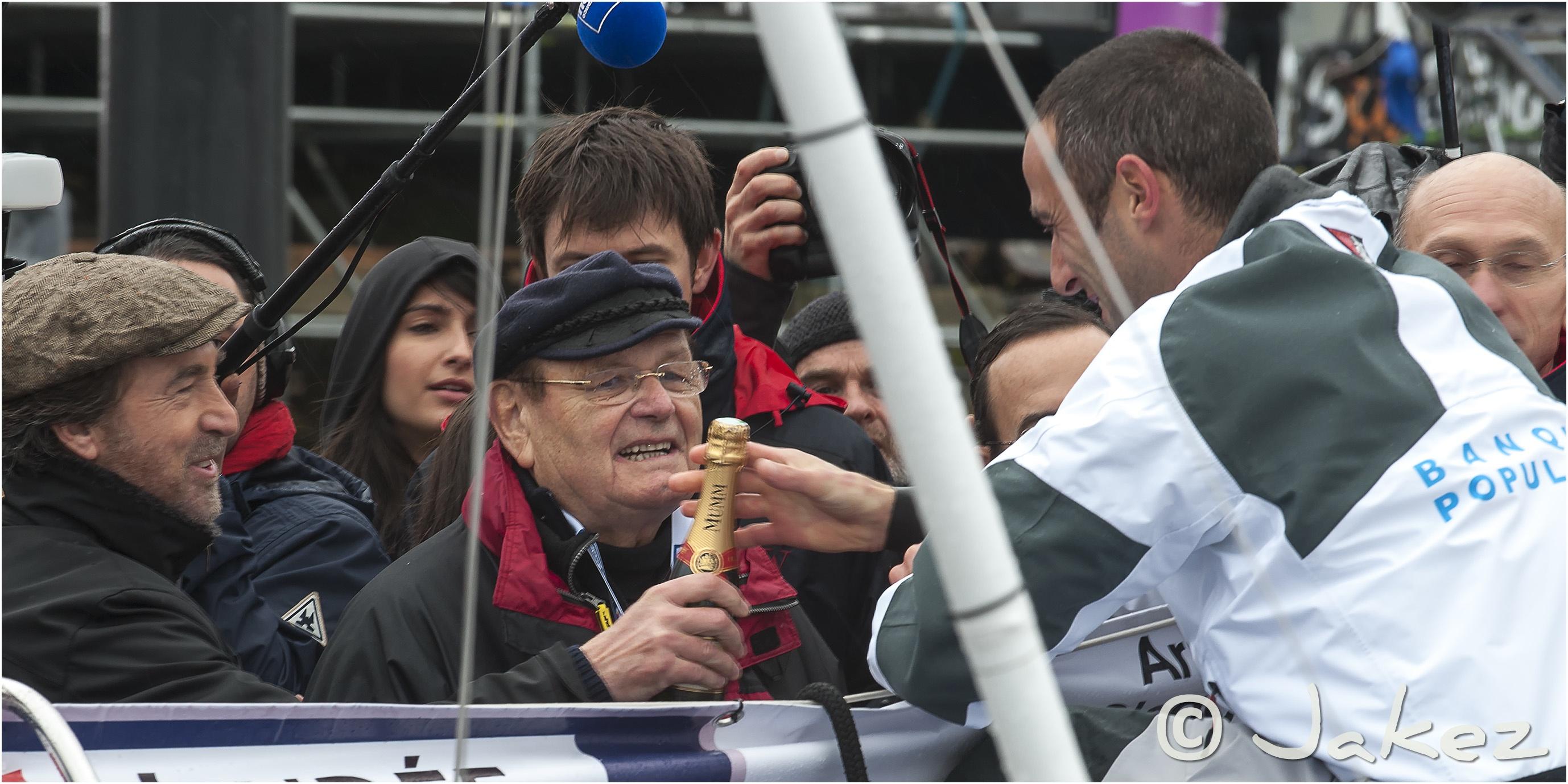 0266-Vendée 2012 (Ponton)